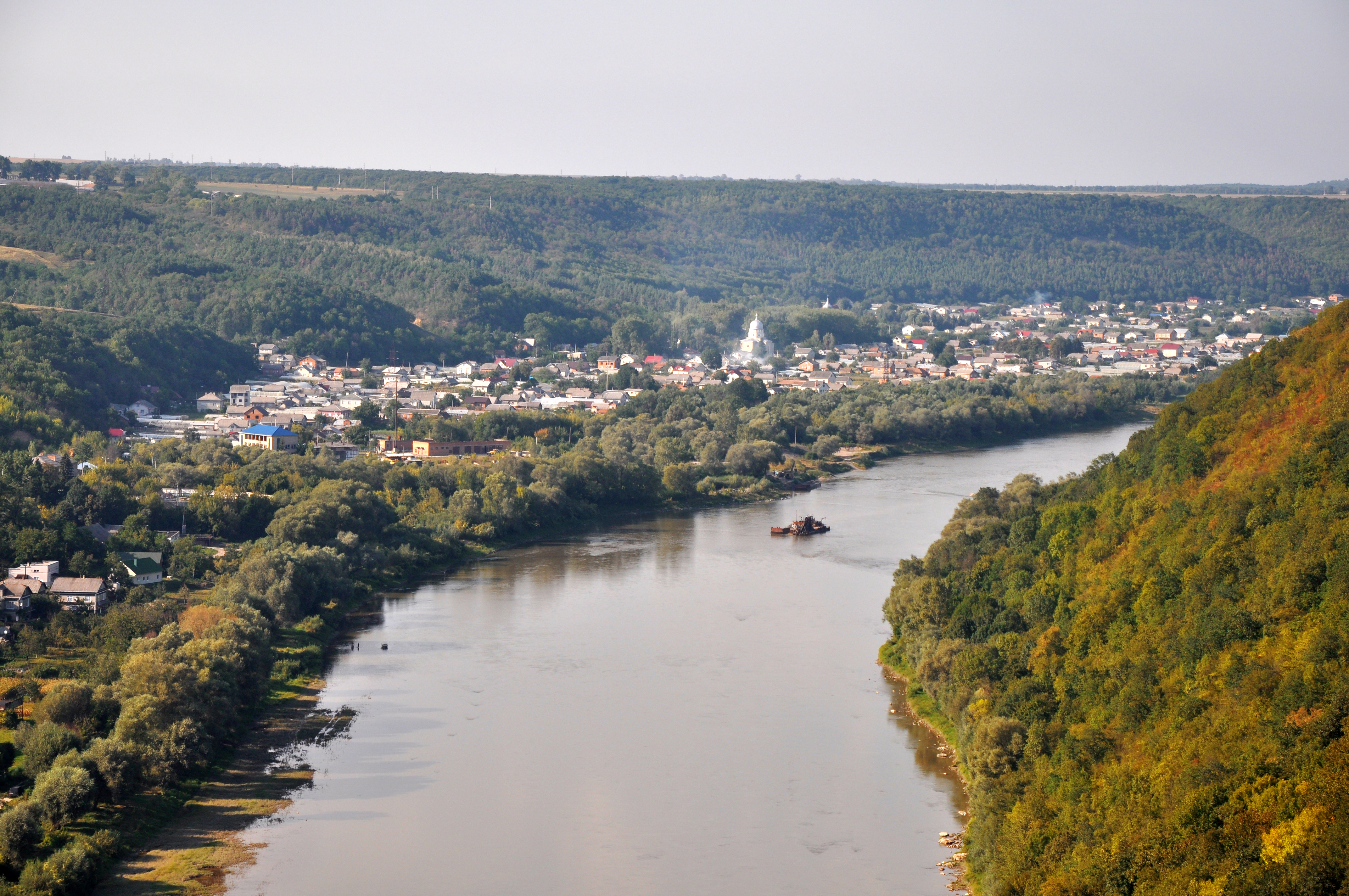 «Обiжевський», Заліщицький район, с. Добрівляни, північна околиця, Заліщицьке лісництво, кв. 74 в. 1-7; кв. 75 в. 1-8, 18-20; кв. 76 в. 1-6.1, 6.2, 7-11; кв. 77 в. 1-11; кв. 78 в. 1-4, 7-9, 11-15; кв. 79 в. 1-5, 12-14, 18, 26, лісове урочище «Обіжева»